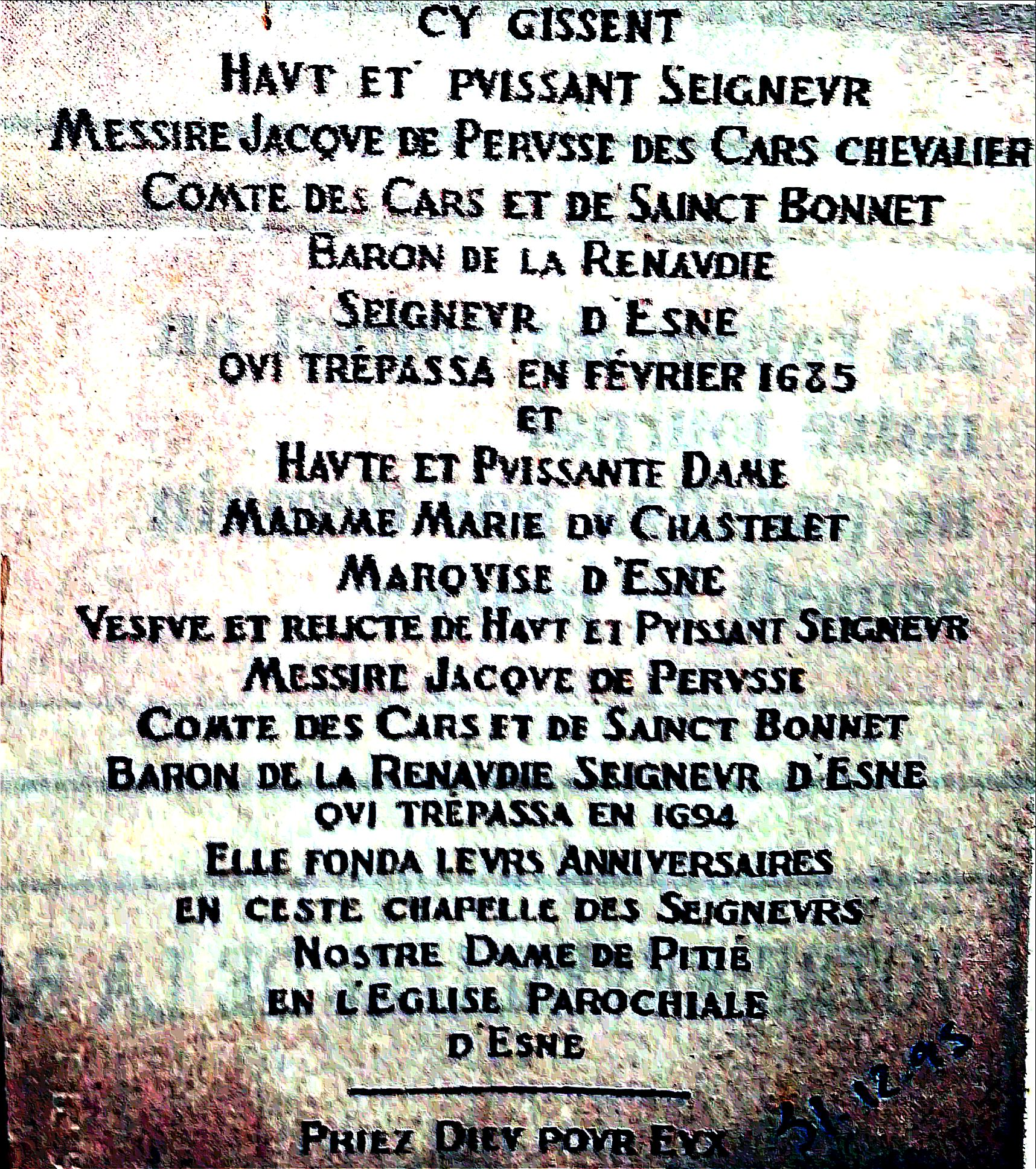 Pierre tombale située dans l'enceinte de l’église actuelle d'Esnes-en-Argonne